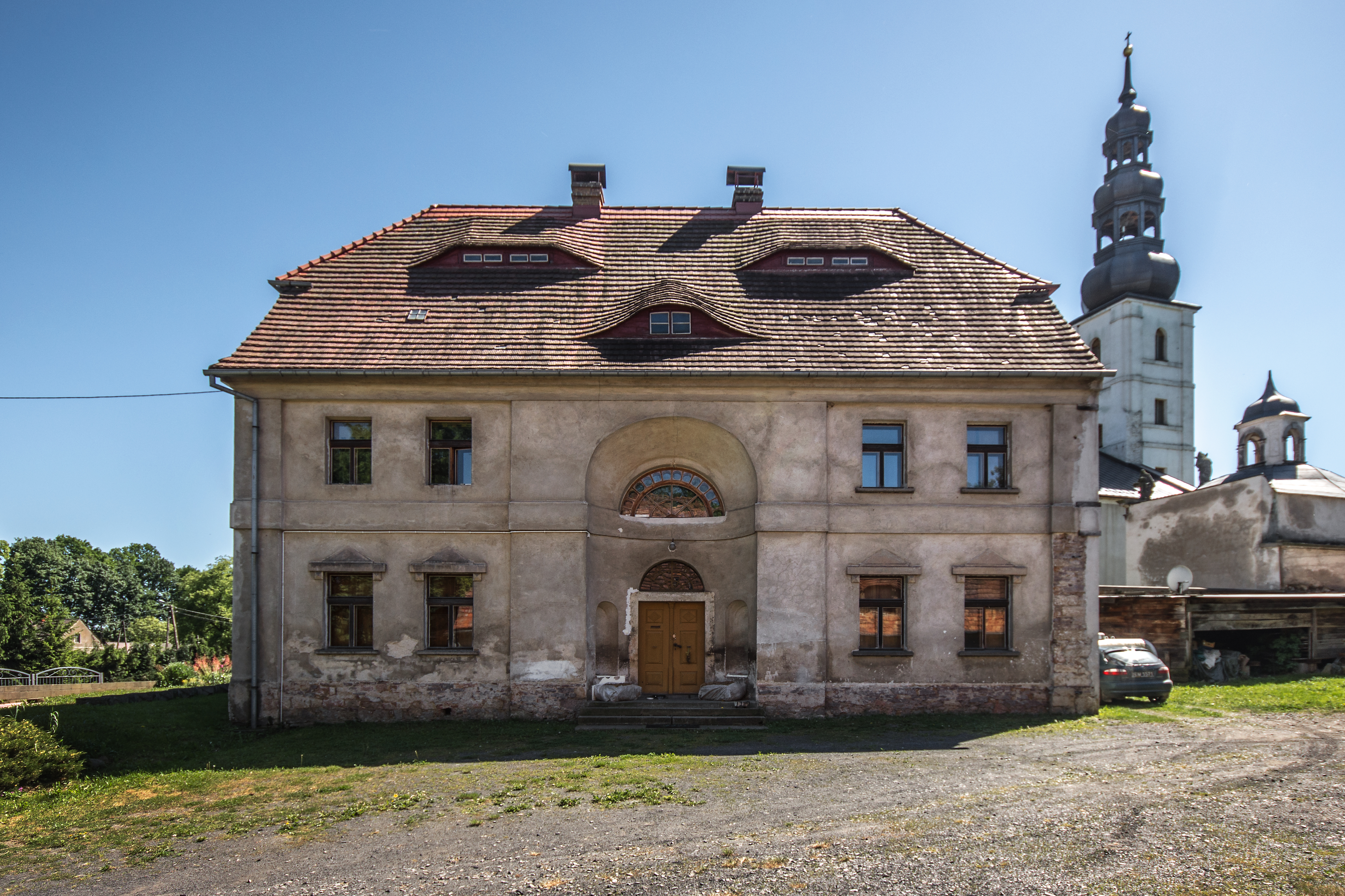 Proboszczów, plebania (przy kościele fil.), pocz. XIX